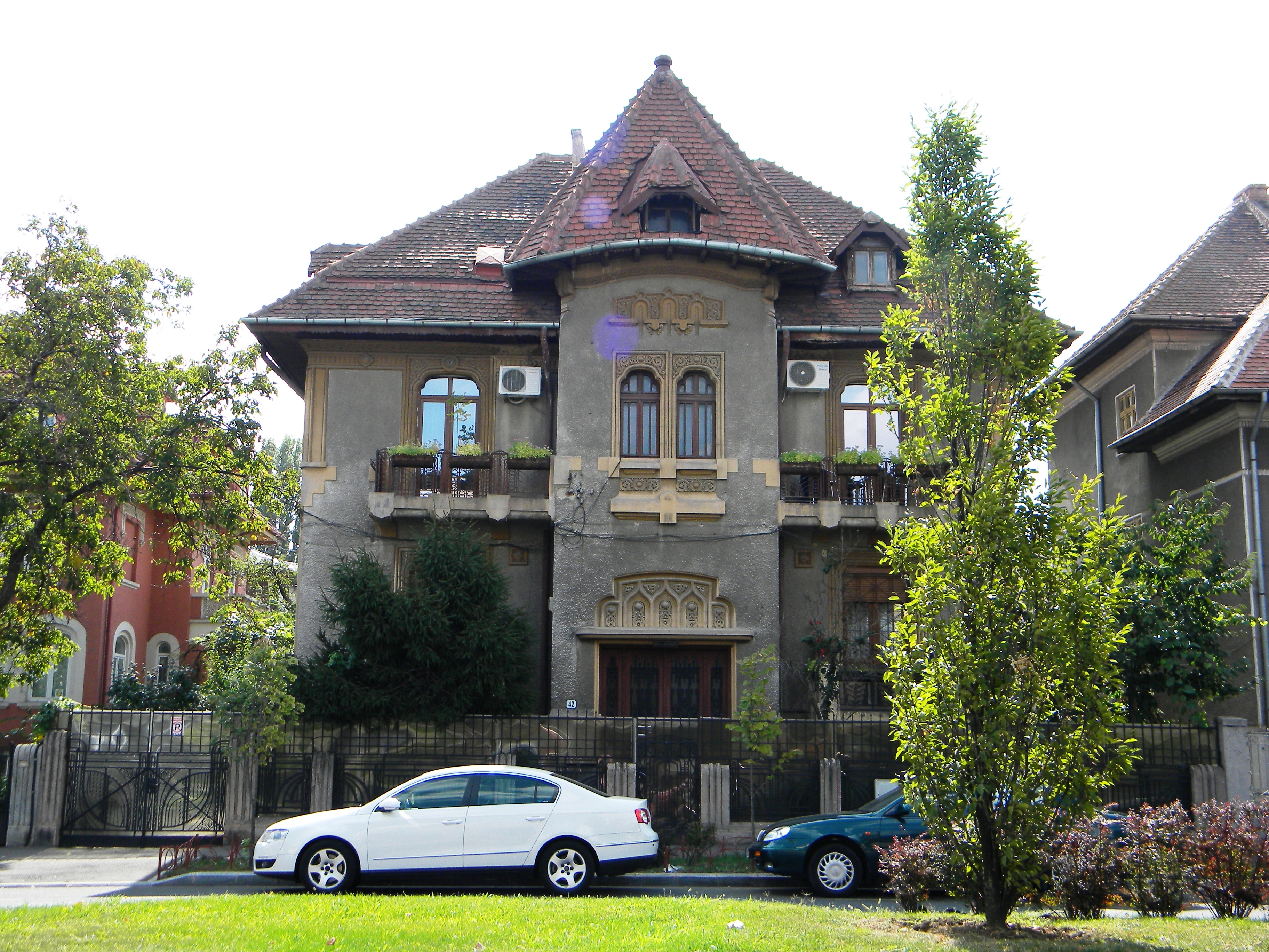 Bucuresti, Romania, Str. Alexandru Constantinescu nr. 42; B-II-m-B-18477 (2)